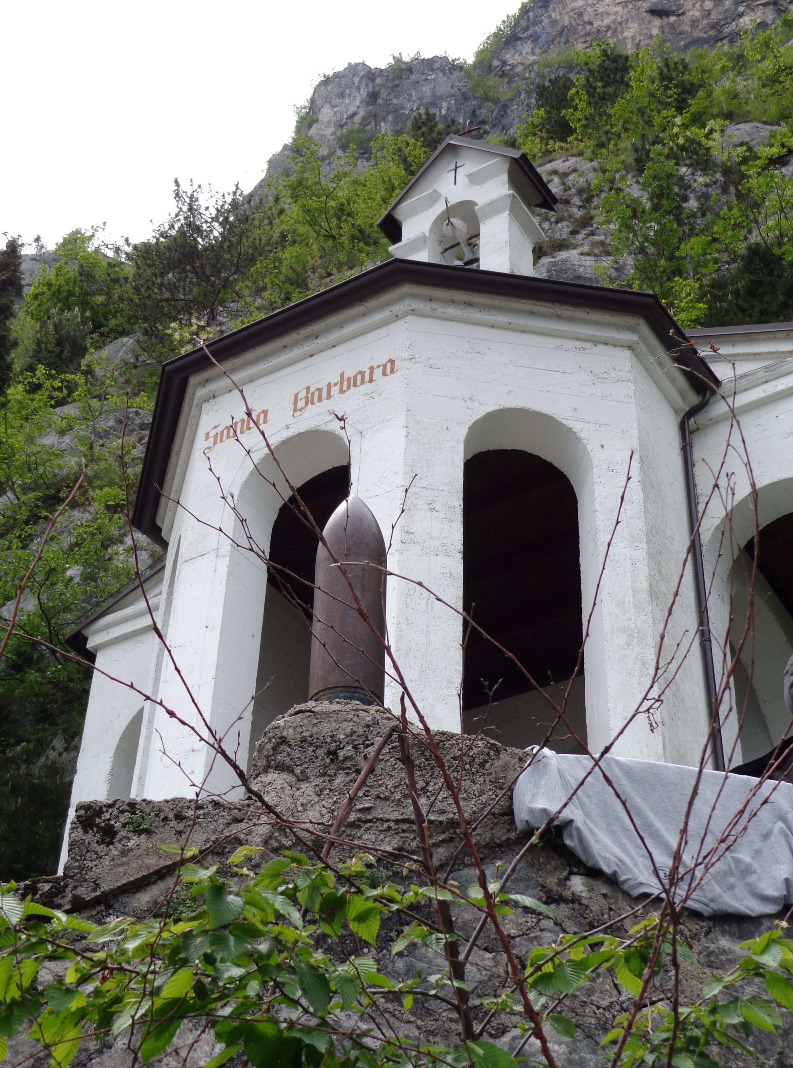 Capella Santa Barbara in der Nähe von Riva del Garda.